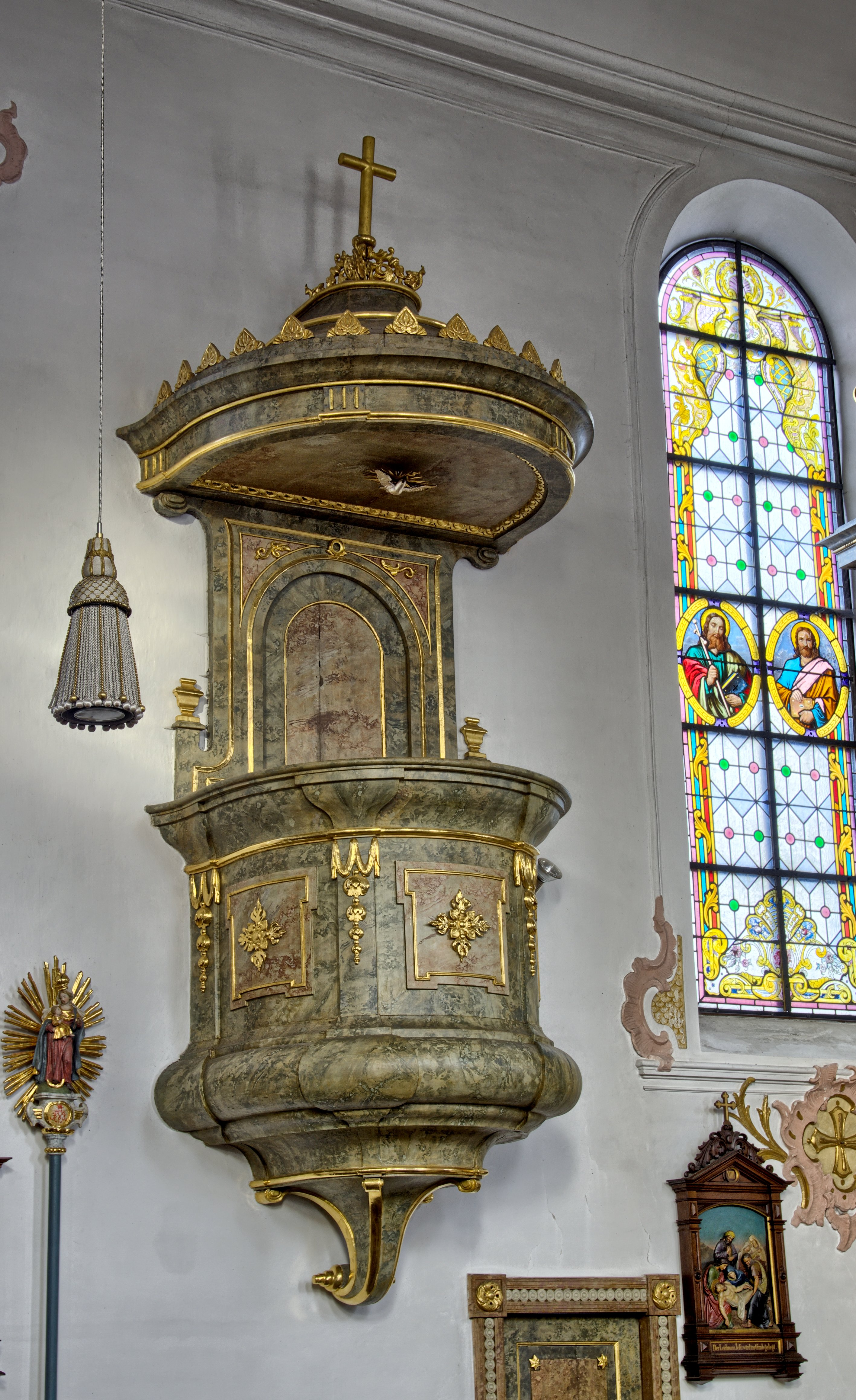 Bilder der Pfarrkirche St. Stephan in Kirchdorf. Die Ortschaft gehört zu Bad Wörishofen